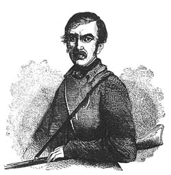 Портрет Ливингстона из статьи Давид Ливингстон и его открытия в Южной Африке.